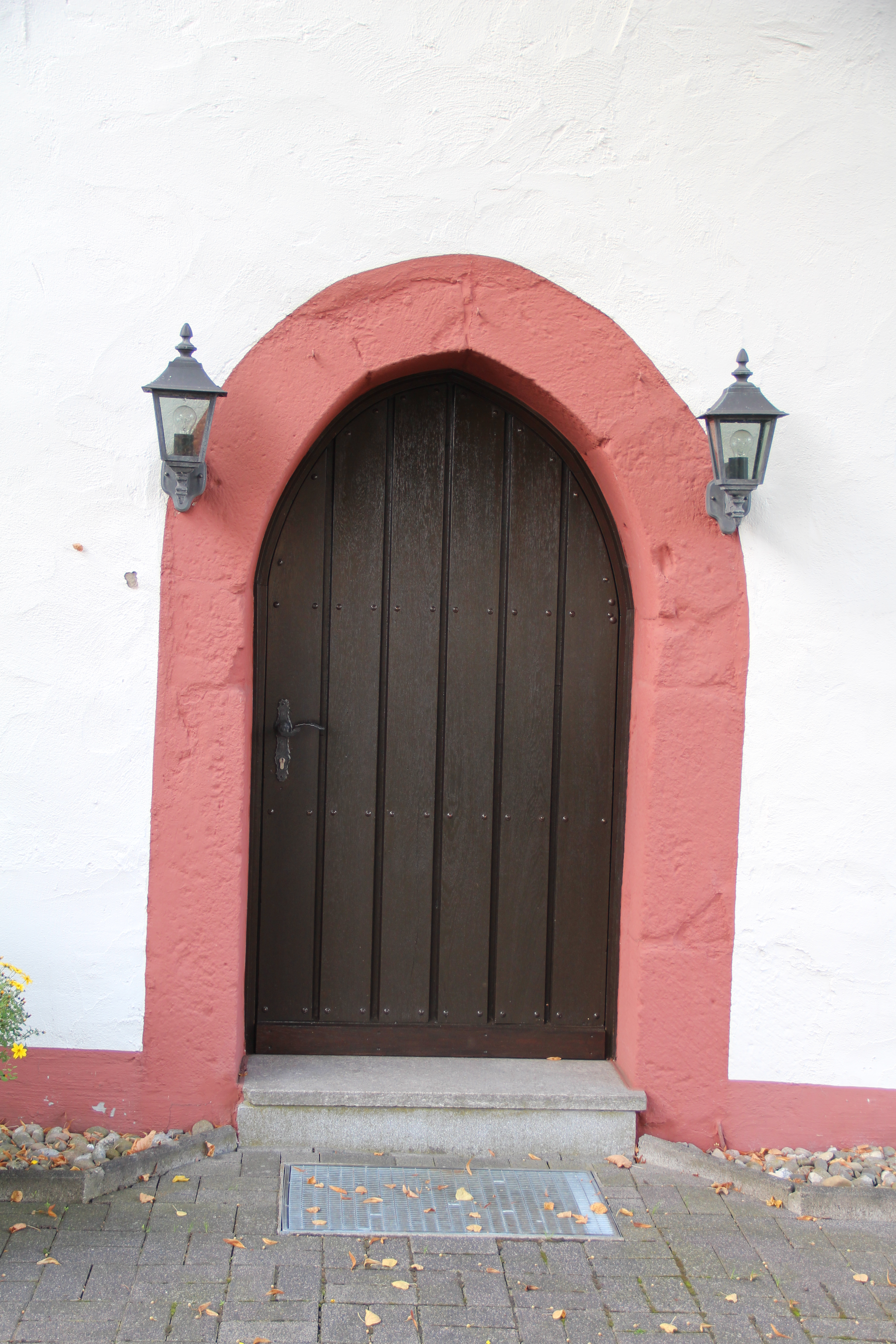 Beltershain